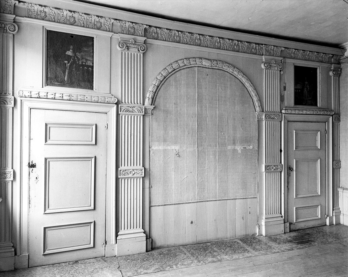 Zicht op de achterkamer 1e verdieping van de Hof van Slijpe in Maastricht. Boven de deuren de in 1953 herontdekte dessus-de-portes met de portretten van Frederik Willem I van Brandenburg en Louise Henriëtte van Nassau, in 1975 uit het pand ontvreemd.